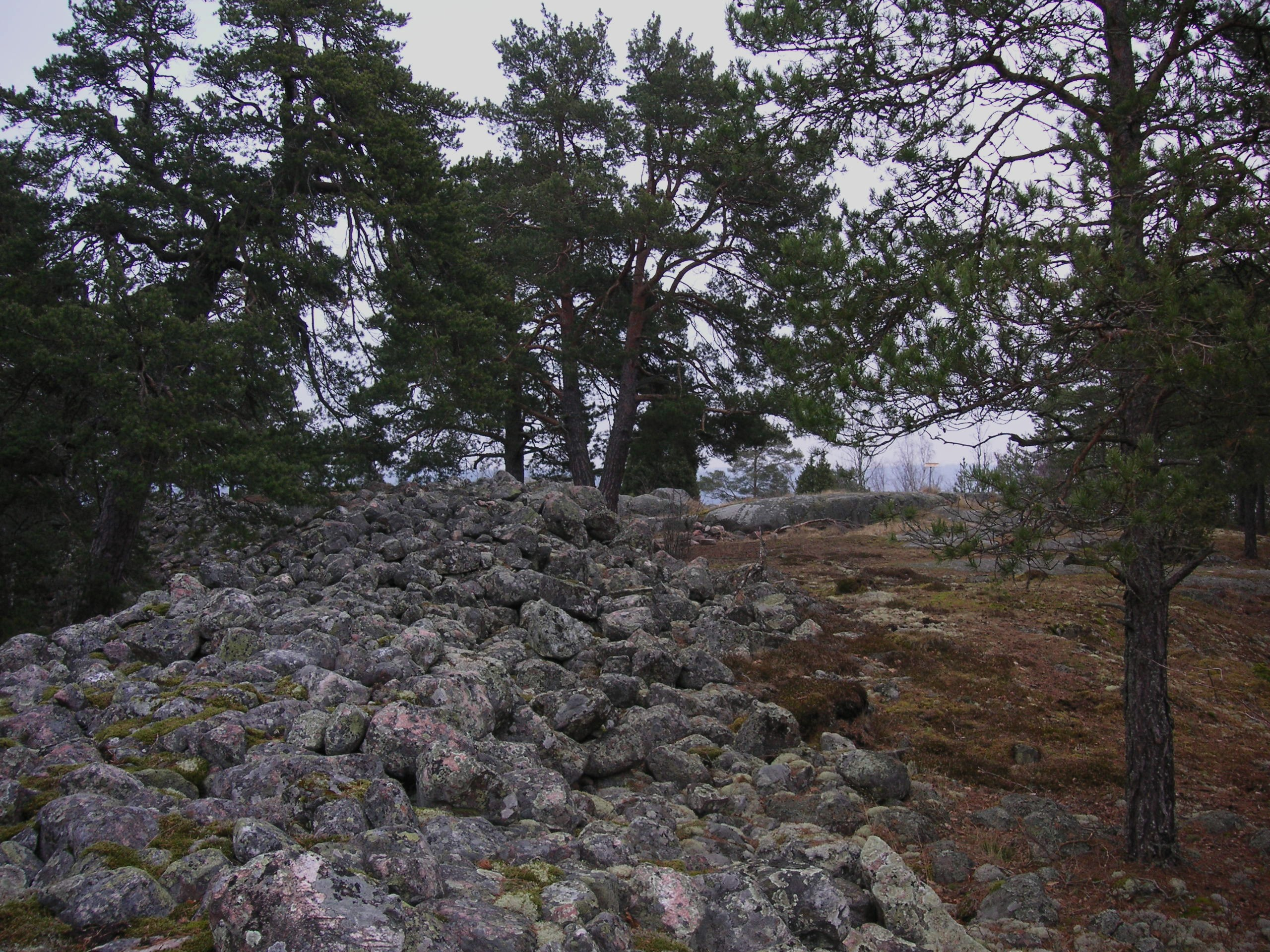 Fornborgen "Skansberget" på Adelsön, i bakgrunden Svinsundet